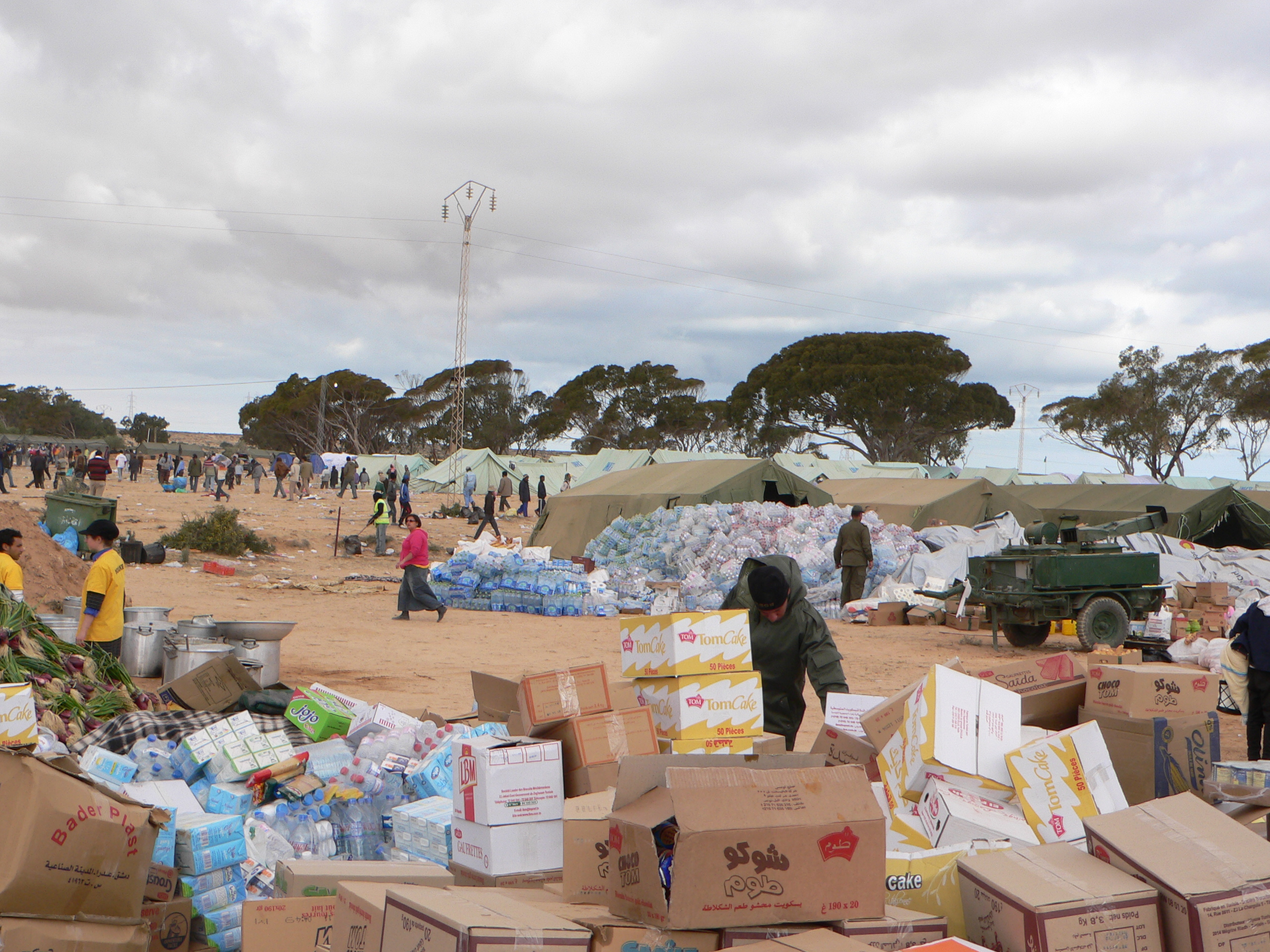 Partie des aides humanitaires des citoyens tunisiens au camp des réfugiés Choucha - Tunisie